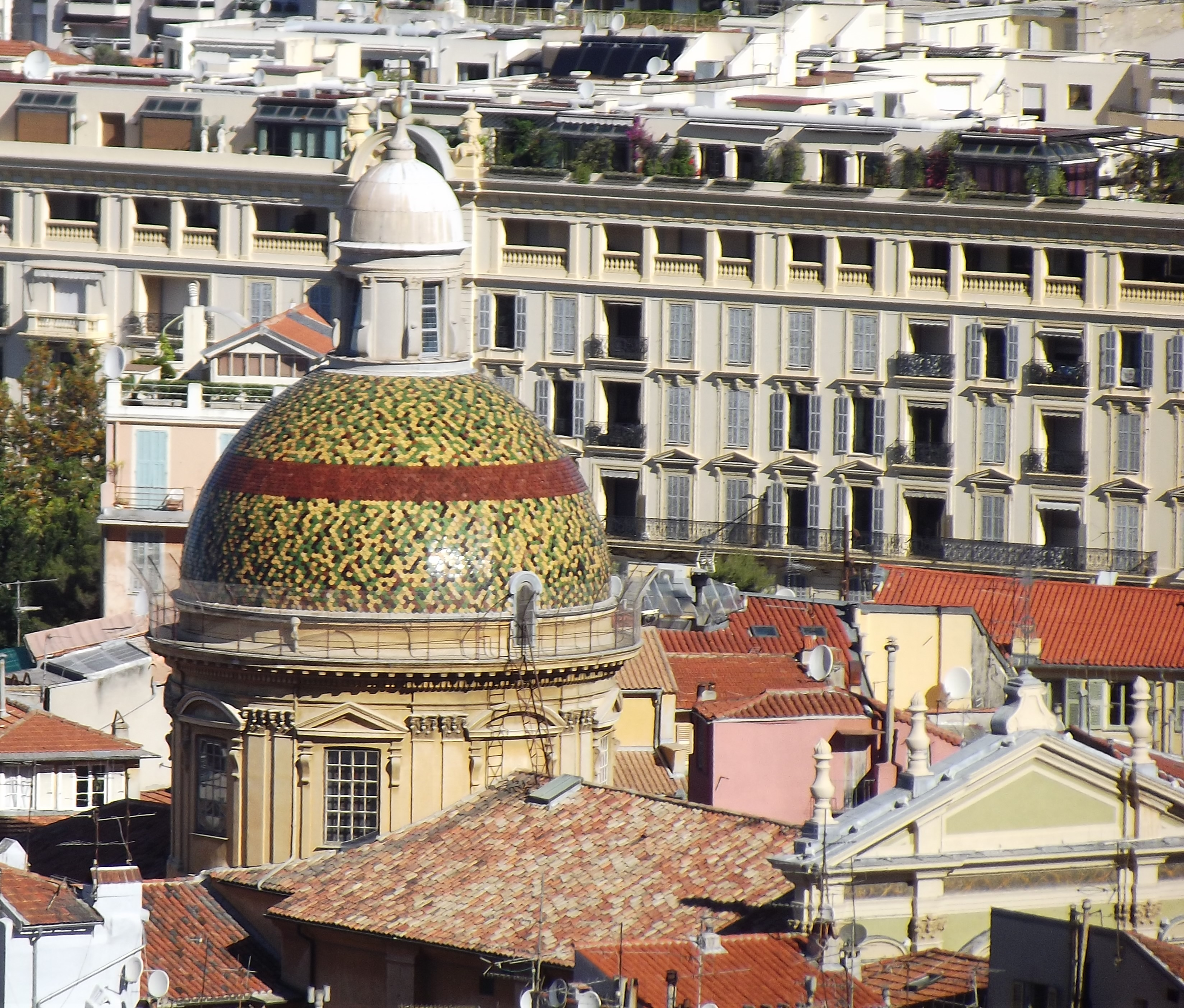 Cathédrale Sainte-Réparate vue de la colline du château